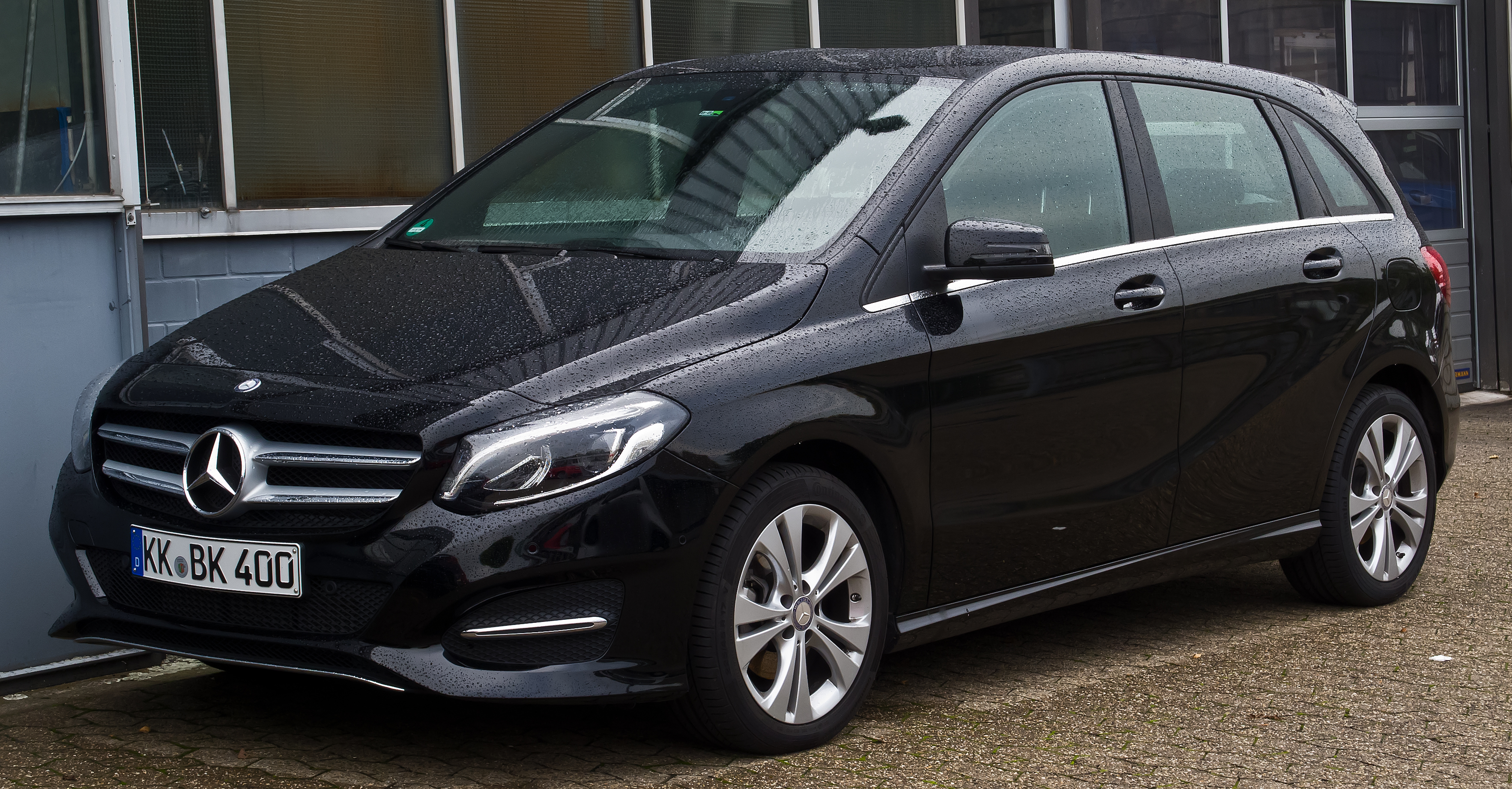 Mercedes-Benz B 180 Urban (W 246, Facelift)